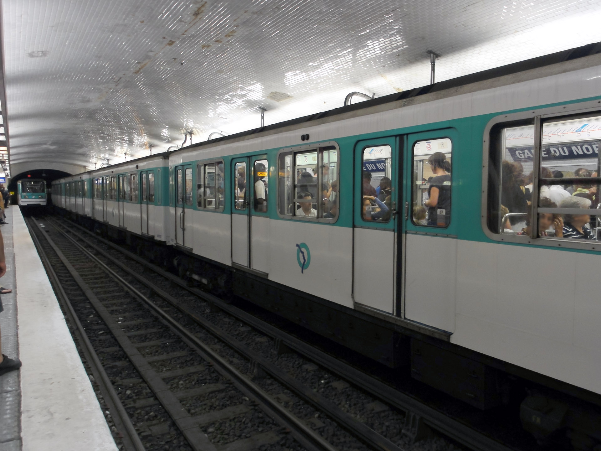 La station Gare du Nord de la ligne 5 du métro de Paris, France.